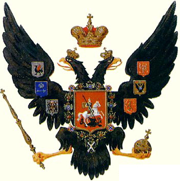 Российская империя 1825–1855 гг. Второй тип государственного герба при Николае I. Бумага, акварель. Государственный Эрмитаж. С.-Петербург